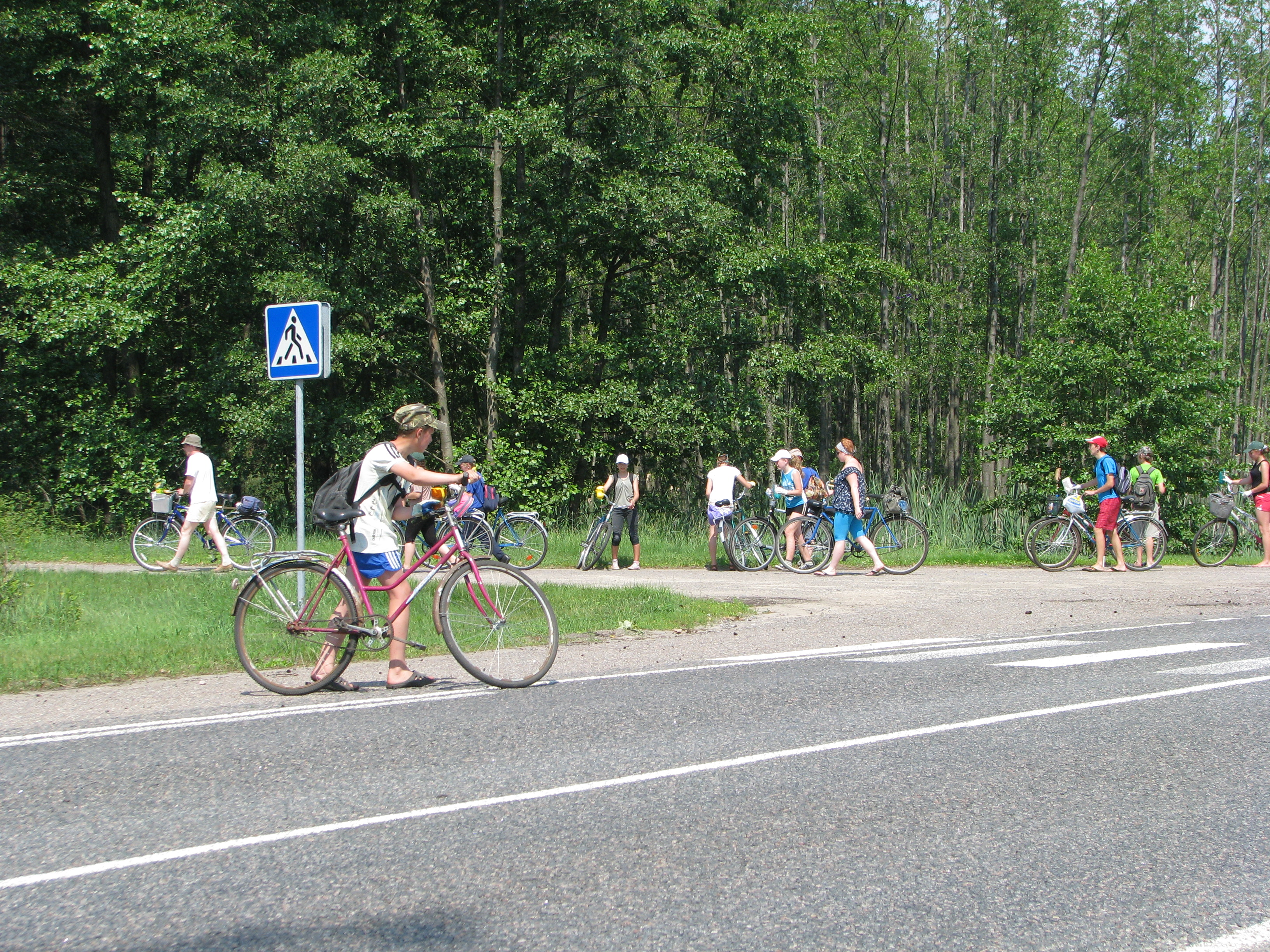 На Зялёным маршруце Між трох азёр